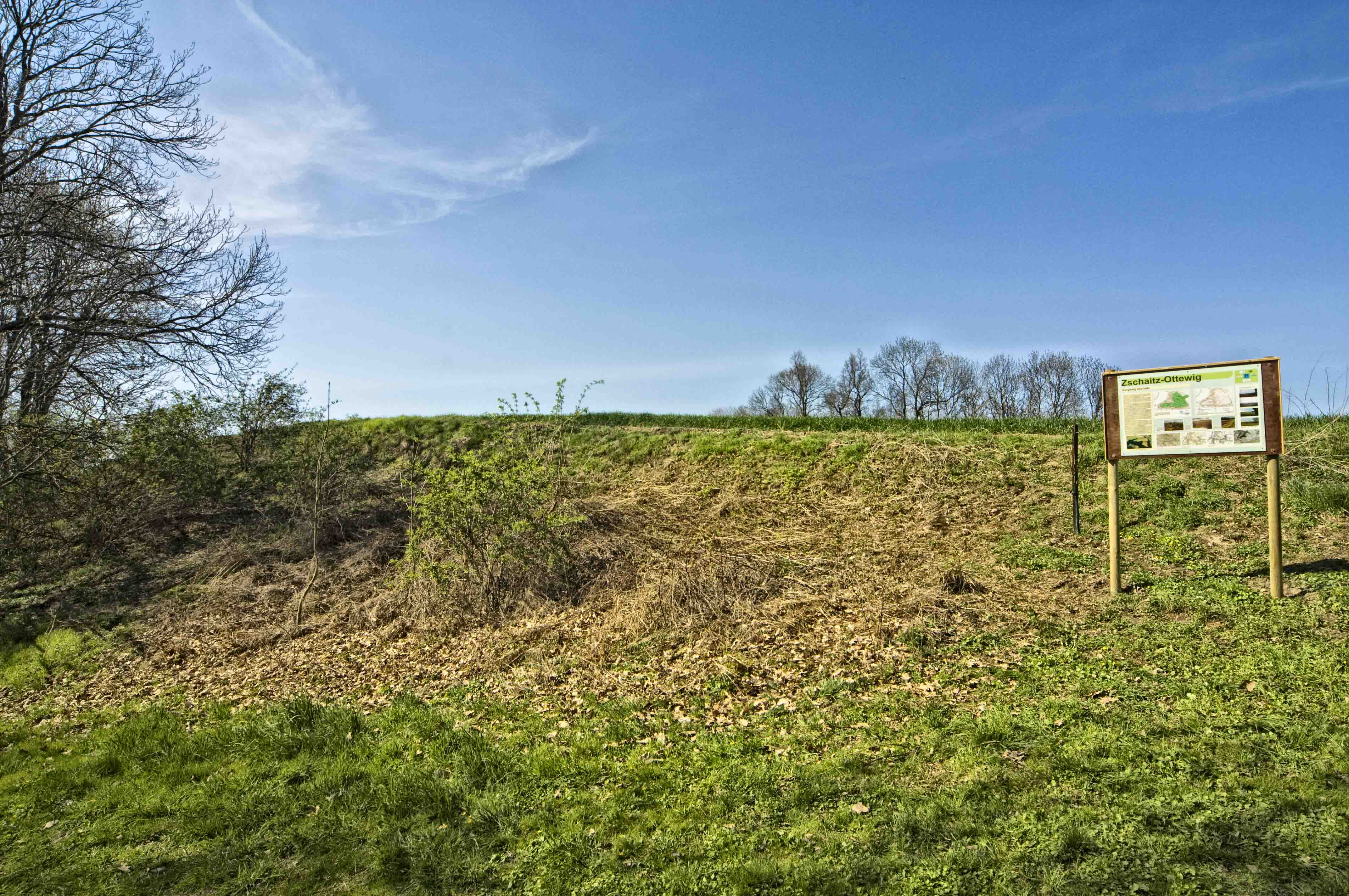 Burgberg Zschaitz